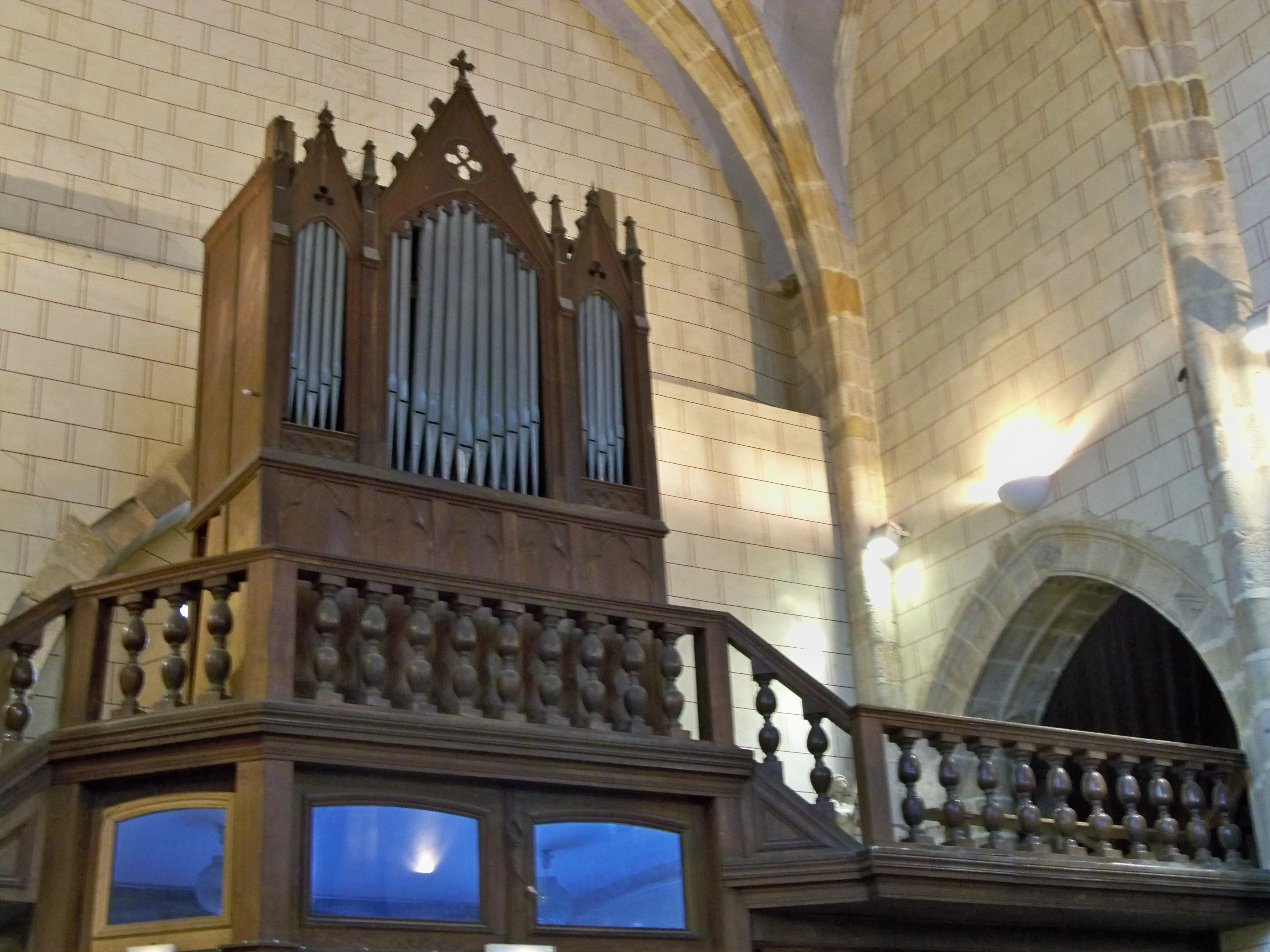 Limours (Essonne, France), église Saint Pierre, orgue des frères Louis & Robert Damiens de 1865, muet depuis 1991.